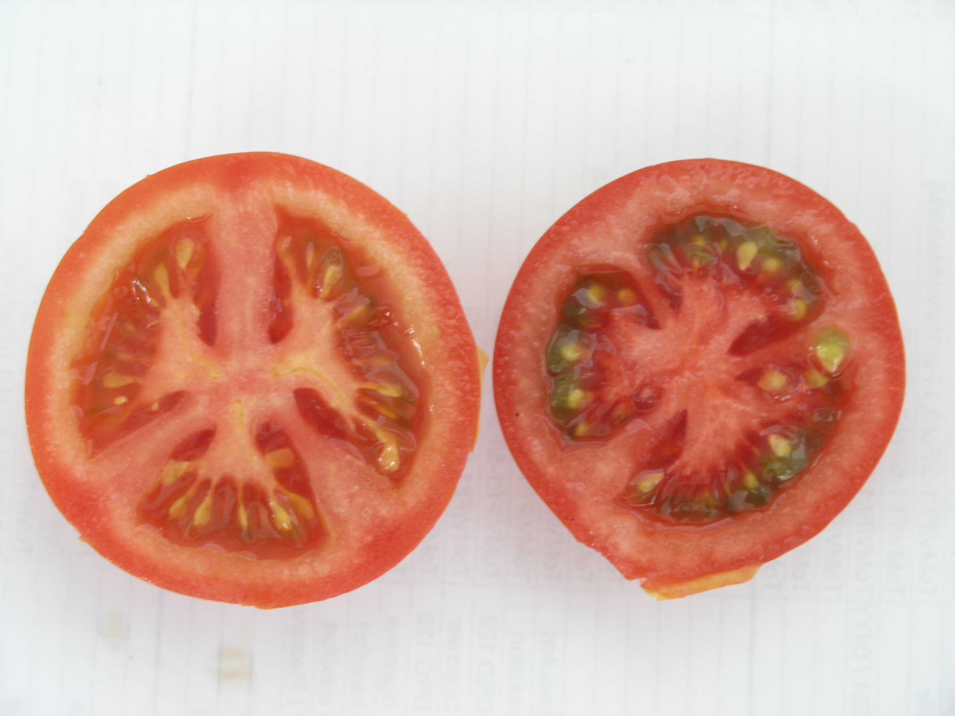 neue Tomatensorte extra rot mit viel Lycopen